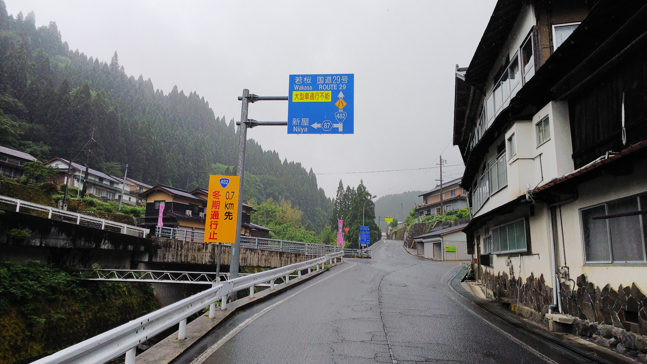 国道482号 兵庫県美方郡香美町小代区秋岡（旧香美町道岩小屋線）入口標識 若桜方面の表示あり。大型車通行不可及び冬季通行止め表記あり